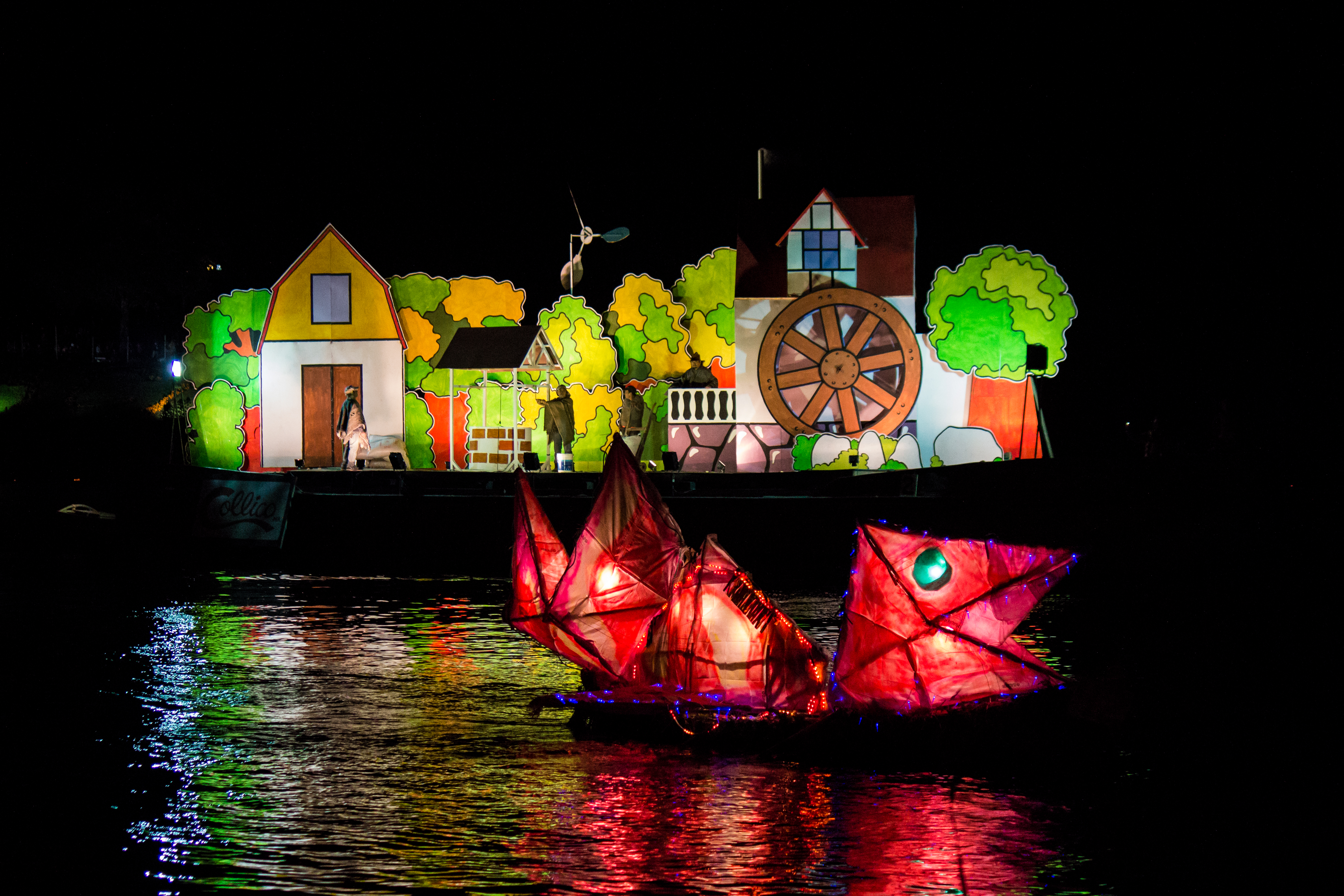 Paso de Embarcaciones engalanadas para el Carnaval Fluvial en Valdivia